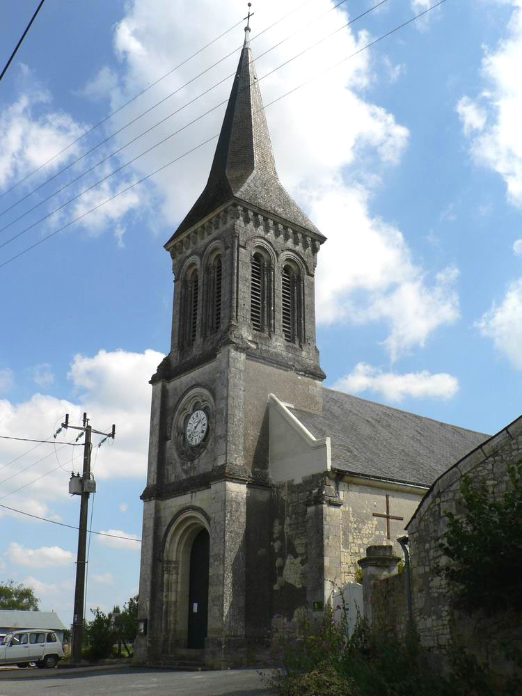 Église de Luigné (Maine-et-Loire, France).